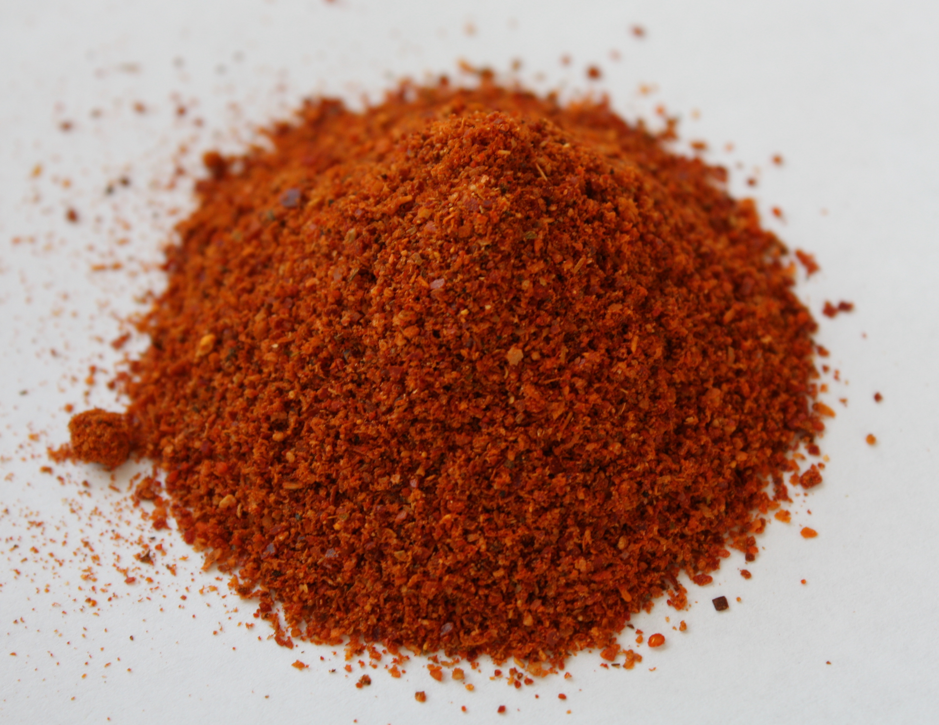 bulgarian spices: Salz und Scharene sol (in Detuschland fälchlicherweise Tschubriza) und Paprikagewürz, ; шарена сол